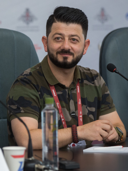 Первый заместитель Председателя ДОСААФ России генерал-лейтенант Владимир Иванович Константинов и актёр Михаил Галустян на Международном военно-техническом форуме «Армия-2016». Московская область, парк «Патриот», 8 сентября 2016.